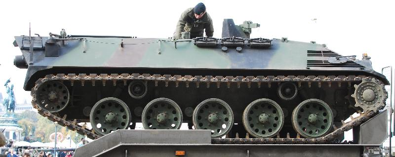 Saurer-Schützenpanzer des österreichischen Bundesheers